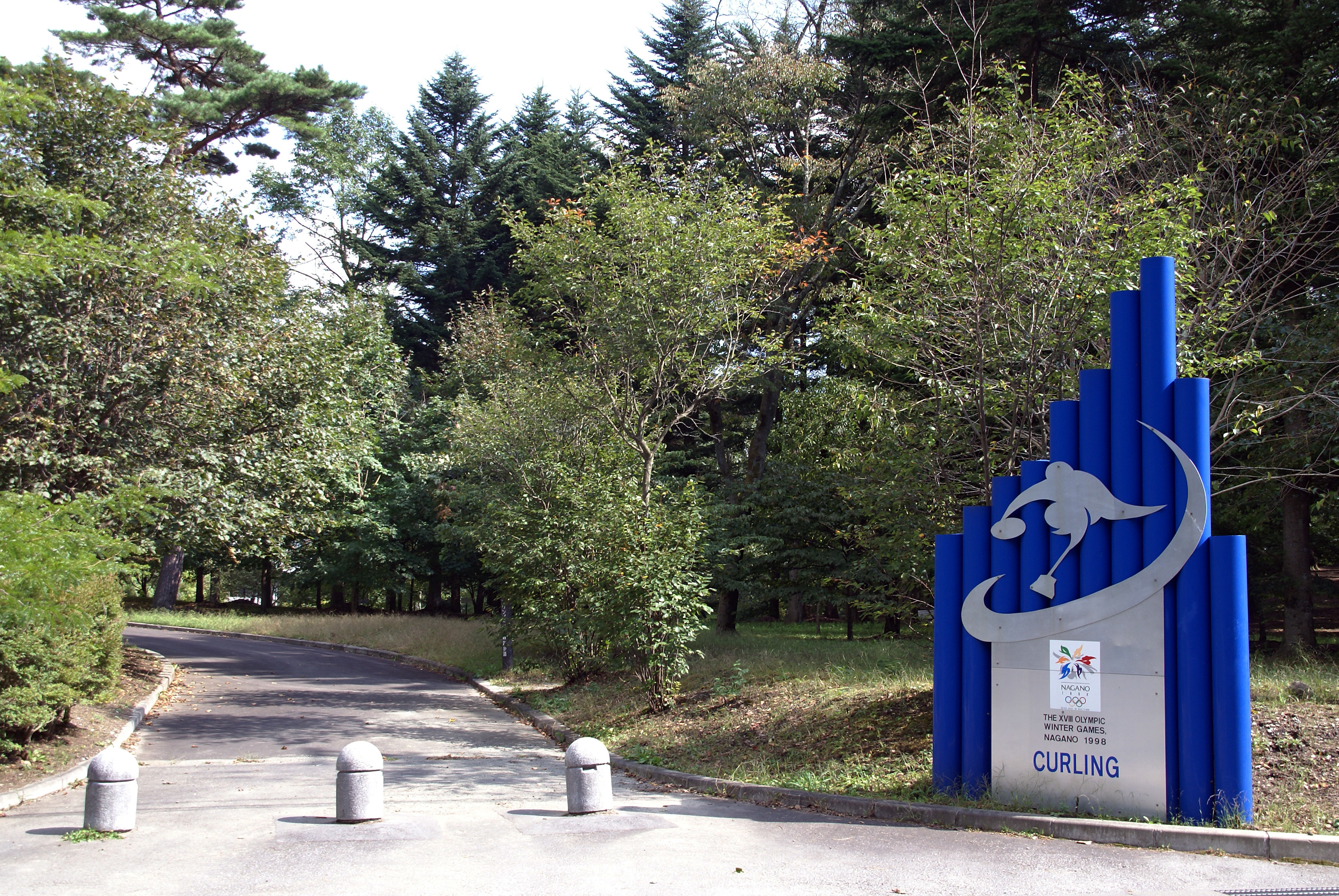 Kazakoshi Park in Karuizawa, Nagano prefecture, Japan